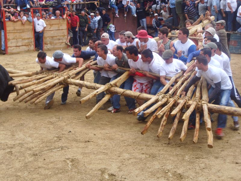 Aldeia Velha- Capeia 2007